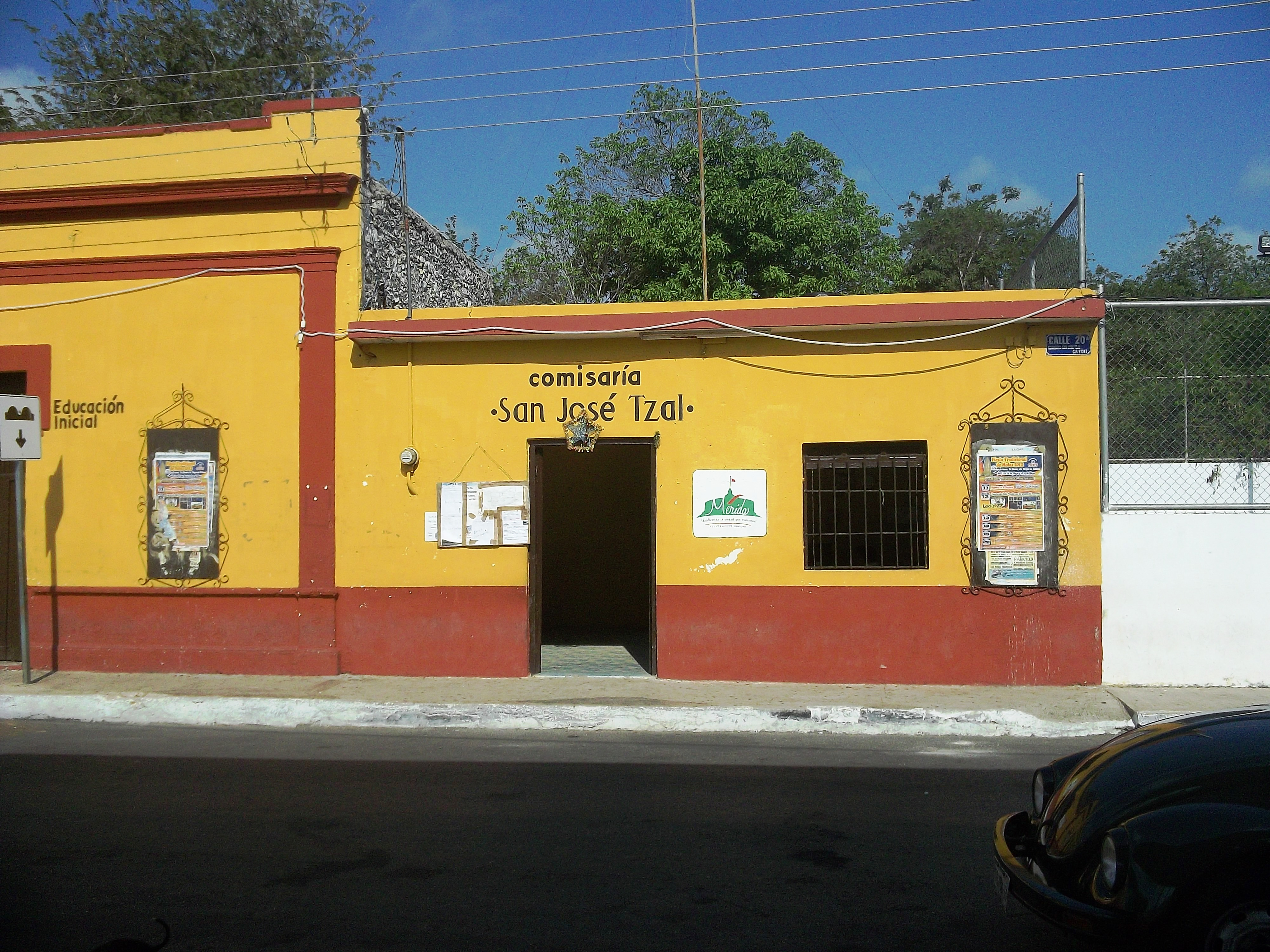 Casa comisarial de San José Tzal, Yucatán.